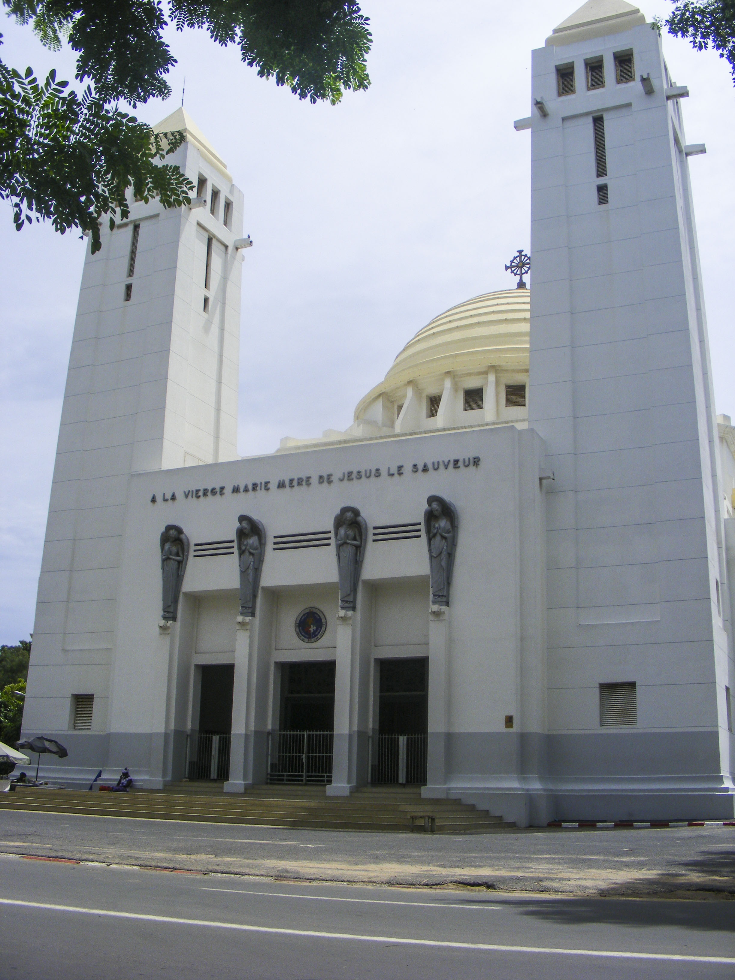 Photo: Lamine Niang